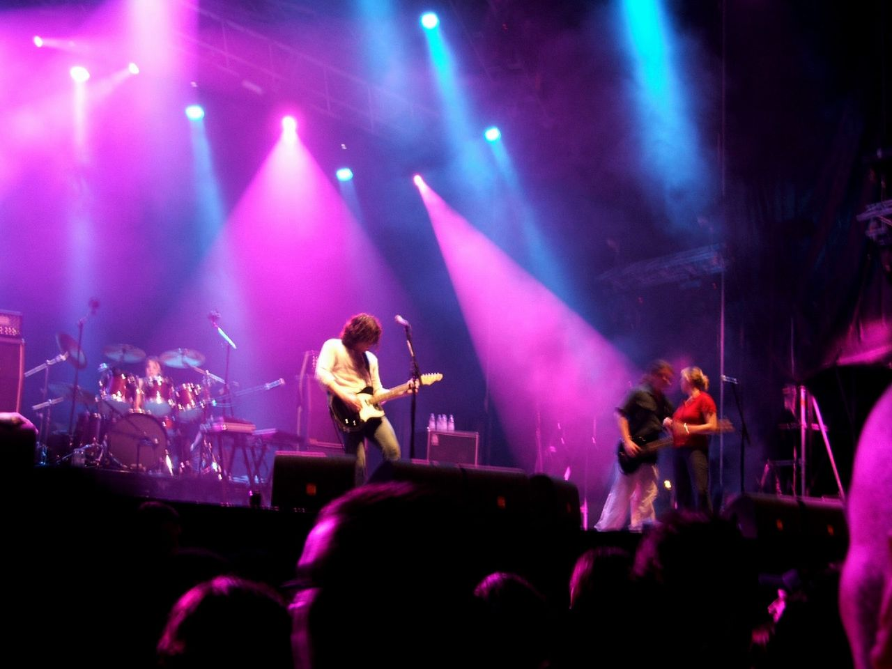 Vilar de Mouros Festival 2005 in Portugal Camera :Finepix S5500